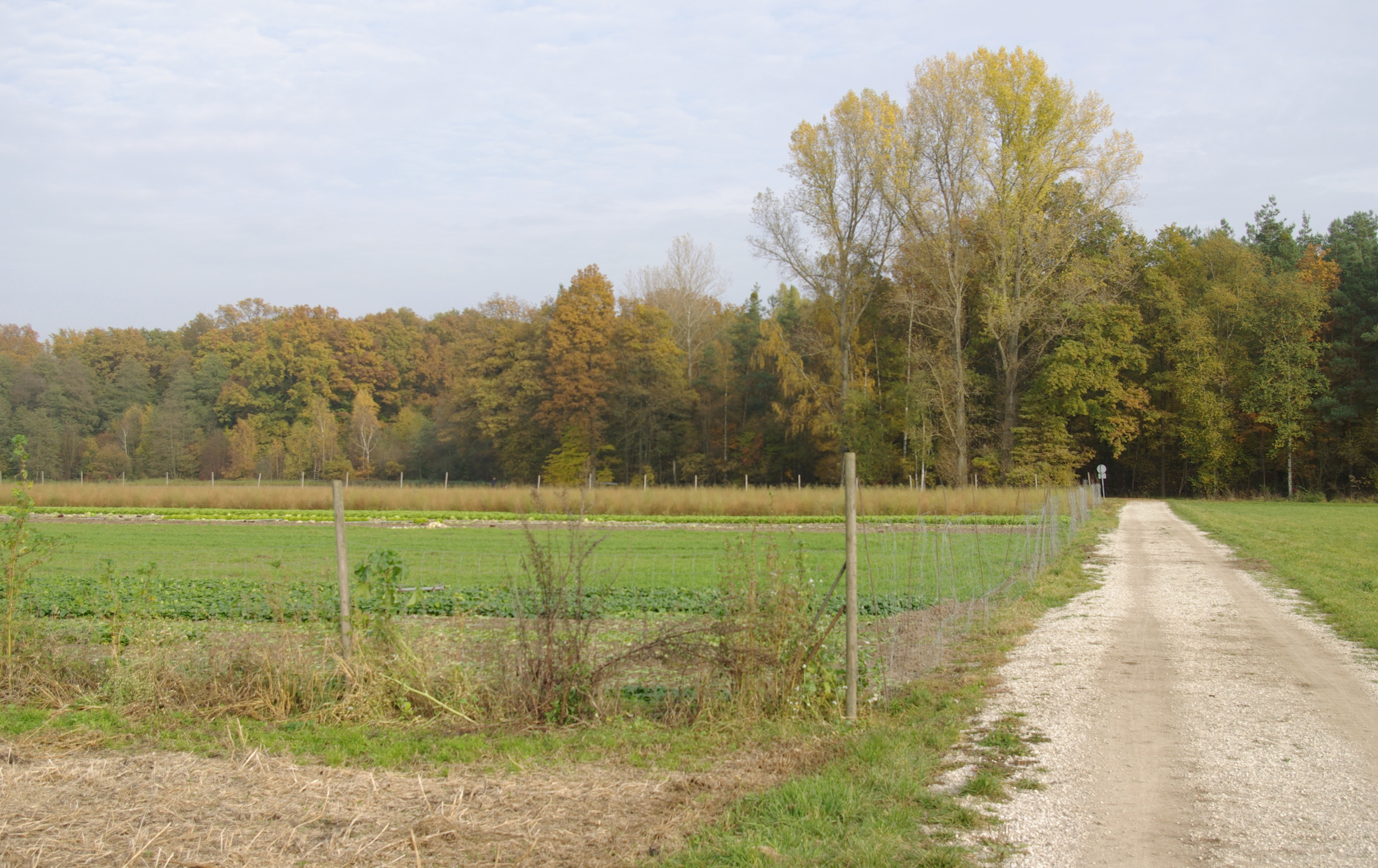 Waldrand am Kraftshofer Forst